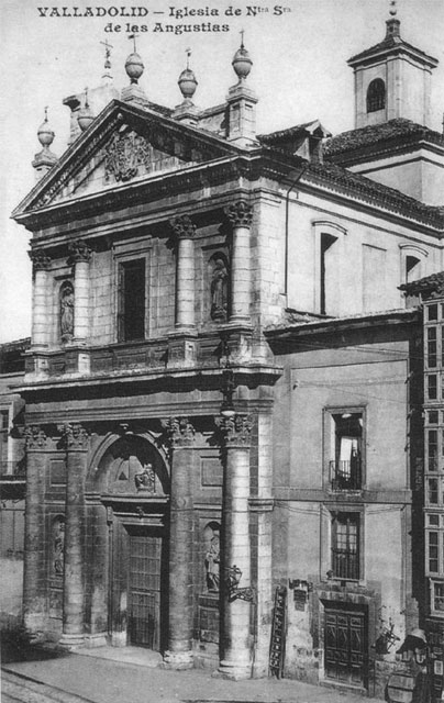 Iglesia de Nuestra Señora de las Angustias - Valladolid - Colección Valladolid, postales para el Recuerdo, editada por el Diario El Mundo de Valladolid. Iglesia de Nuestra Señora De las Angustias. - Fotografía. Papel 90 x 140 B/N